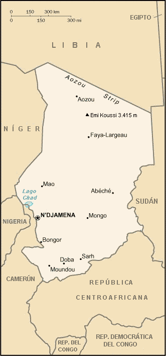 Mapa de la CIA World Factbook traducido al español por Sanbec ✉. El original en [1] está en el dominio público.